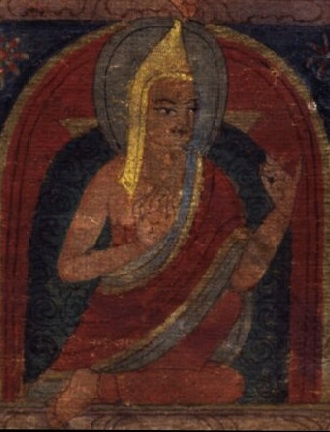 Drubchen Namkha Gyeltsen, b.1326 - d.1401, tibetan lama